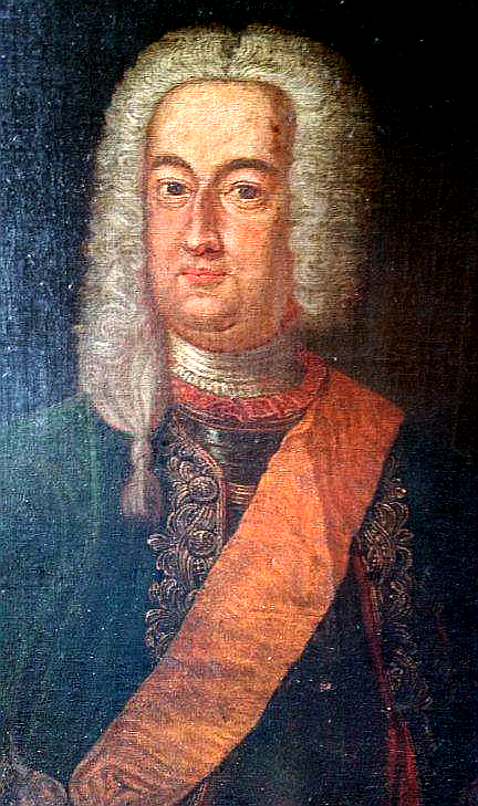 Ölgemälde (Ausschnitt) mit dem Porträt des Albrecht Wolfgang Graf zu Schaumburg-Lippe (1699-1748) des Malers Johann Heinrich Tischbein der Ältere, aus dem Besitz der Familie um den Chocolatier Achim C. Kapelle aus Wölpinghausen